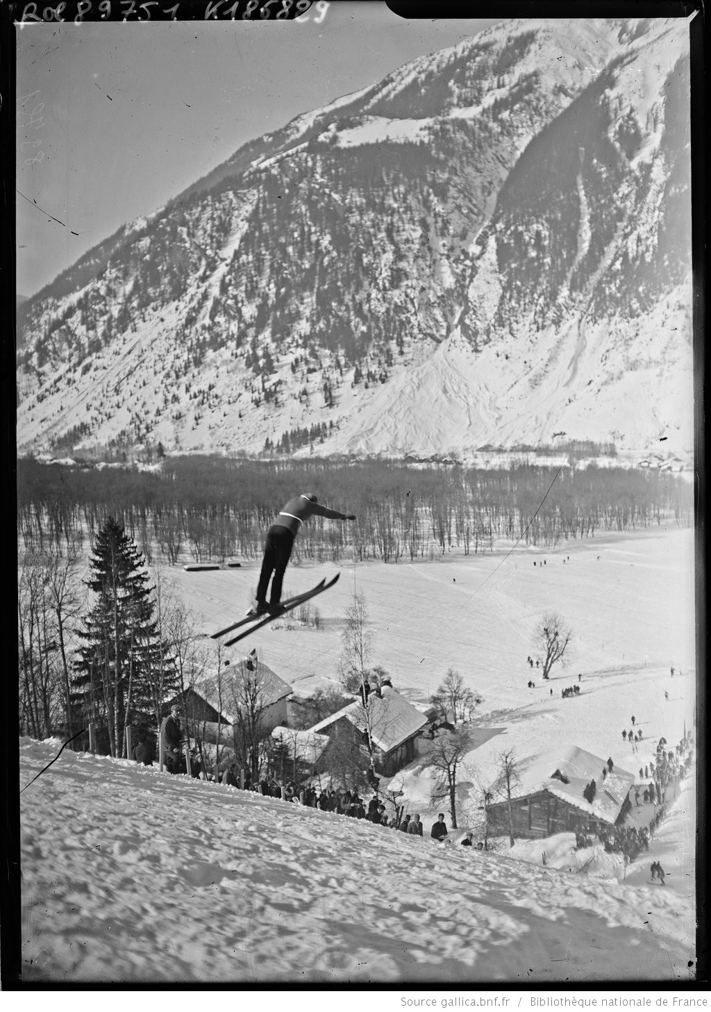 Chamonix, 4/2/24, Eklöf [combiné nordique, saut à ski] : [photographie de presse] / [Agence Rol]